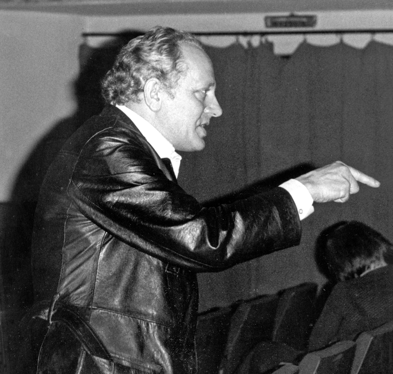 Fryderyk Kremser; działacz PTTK; portret z 1976 roku autorstwa Mirosława Zbigniewa Wojalskiego z Łodzi wykonany w Gdańsku podczas przeglądu Diakraj.